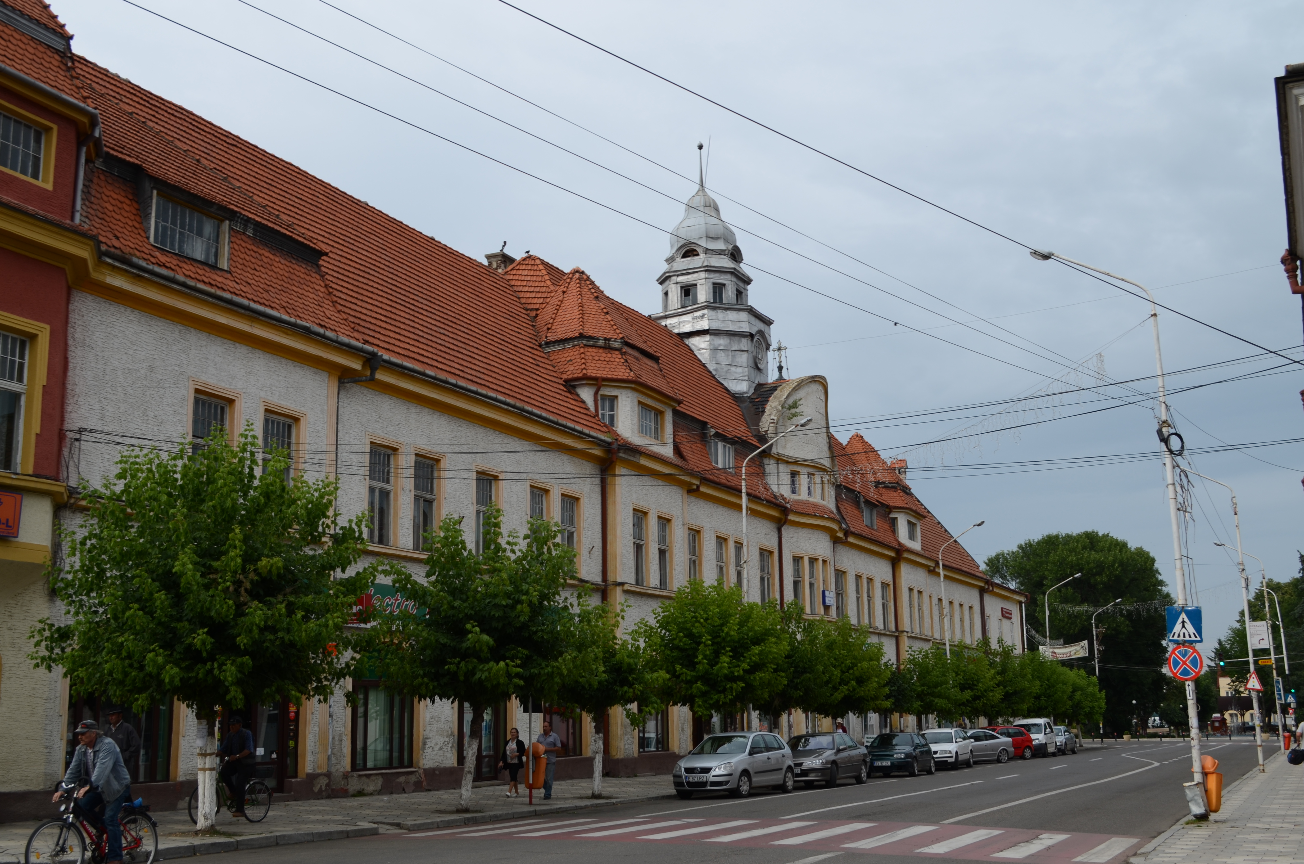 Fosta prefectură și hotel, Piața Unirii nr. 67, Rădăuți